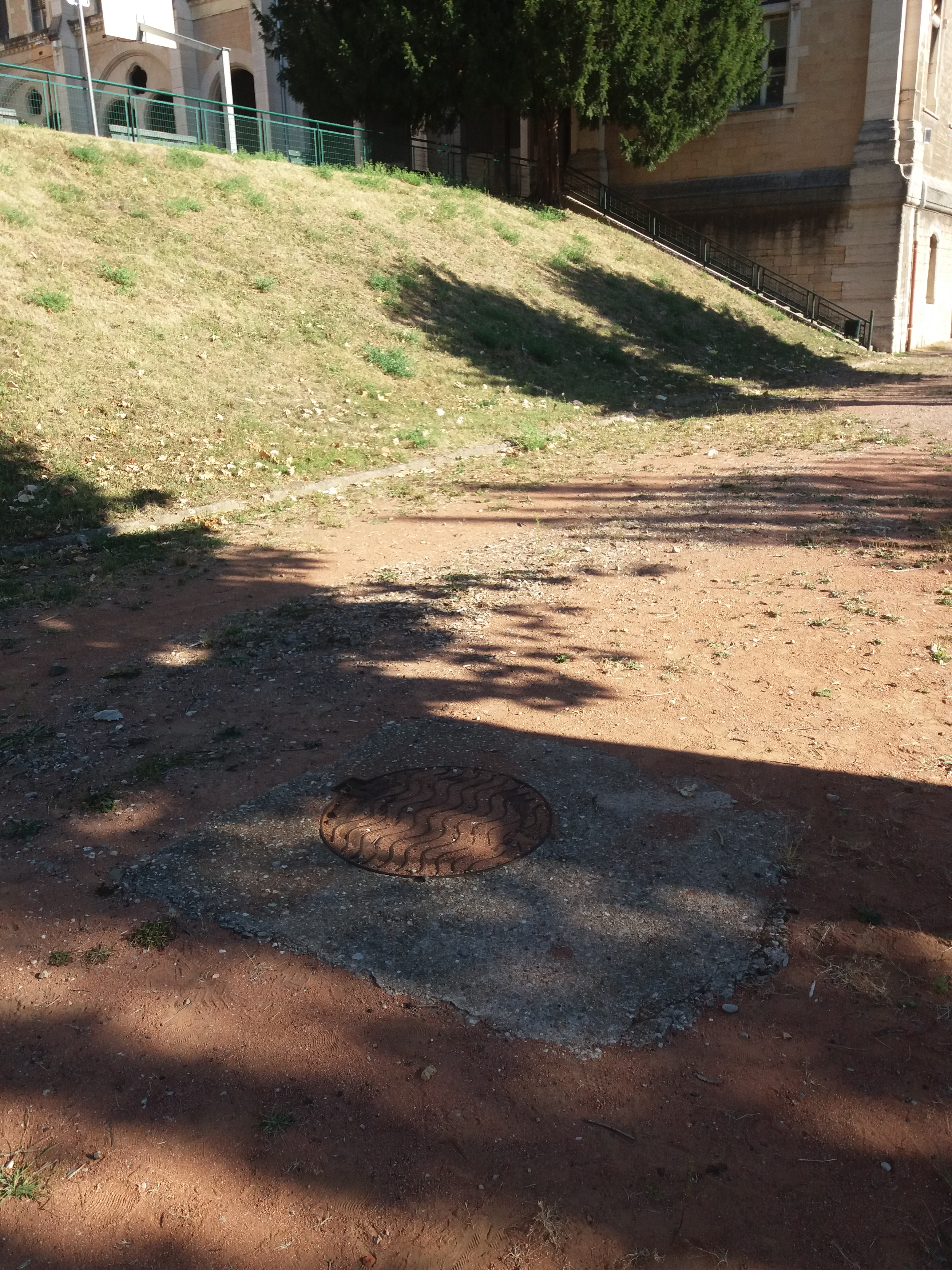 Entrée de la grotte Bérelle.